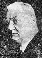 Josef Kozdon